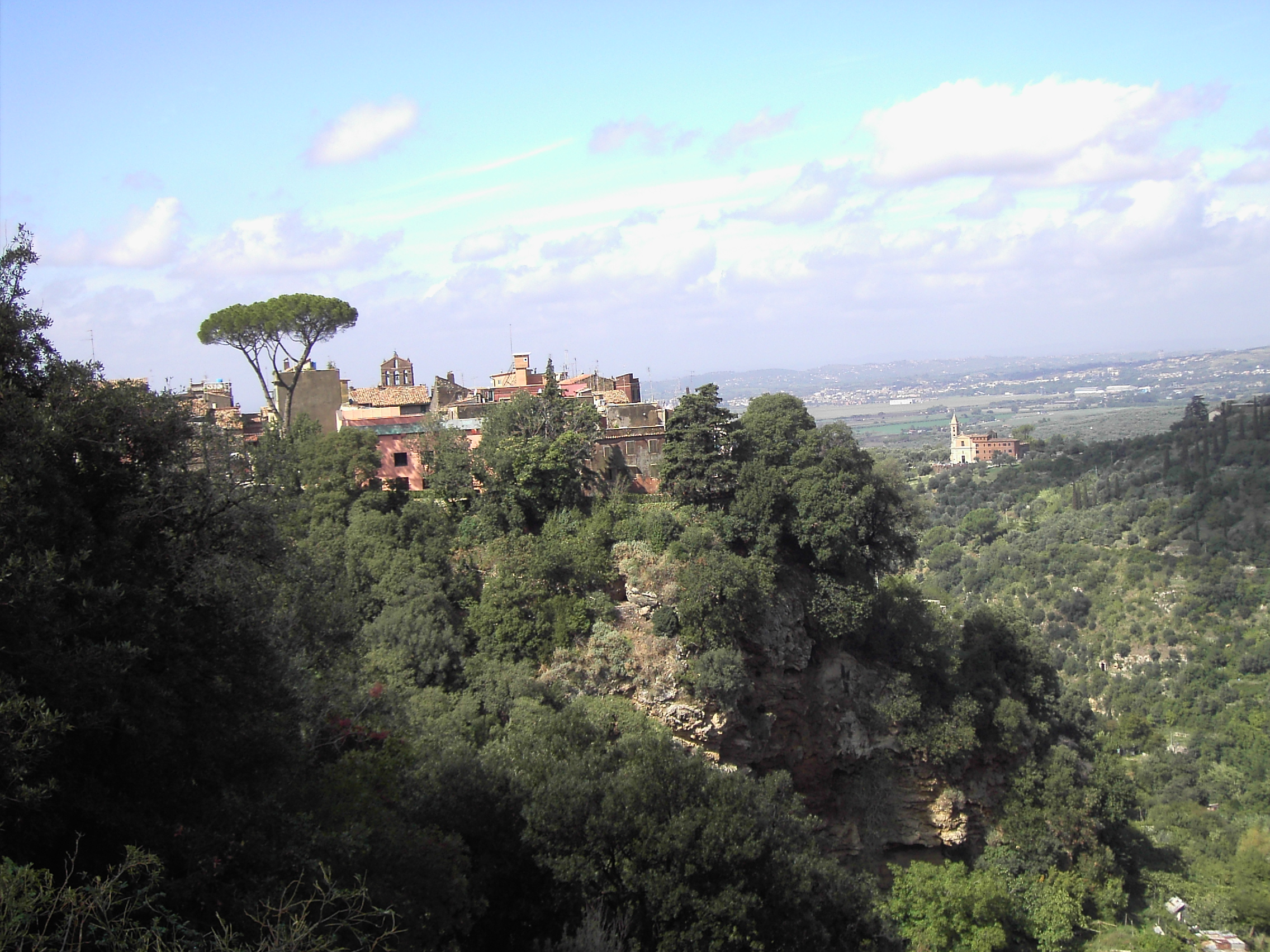 Tivoli, Villa Gregoriana: l'Acropoli (la Cittadella) e Villa Gregoriana by Lalupa